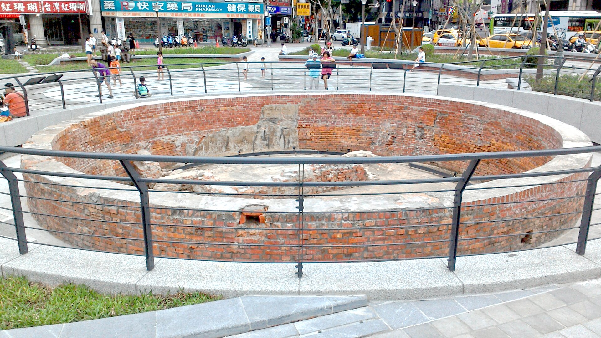 大稻埕圓環防空蓄水池,台北市大同區建成次分區建功里